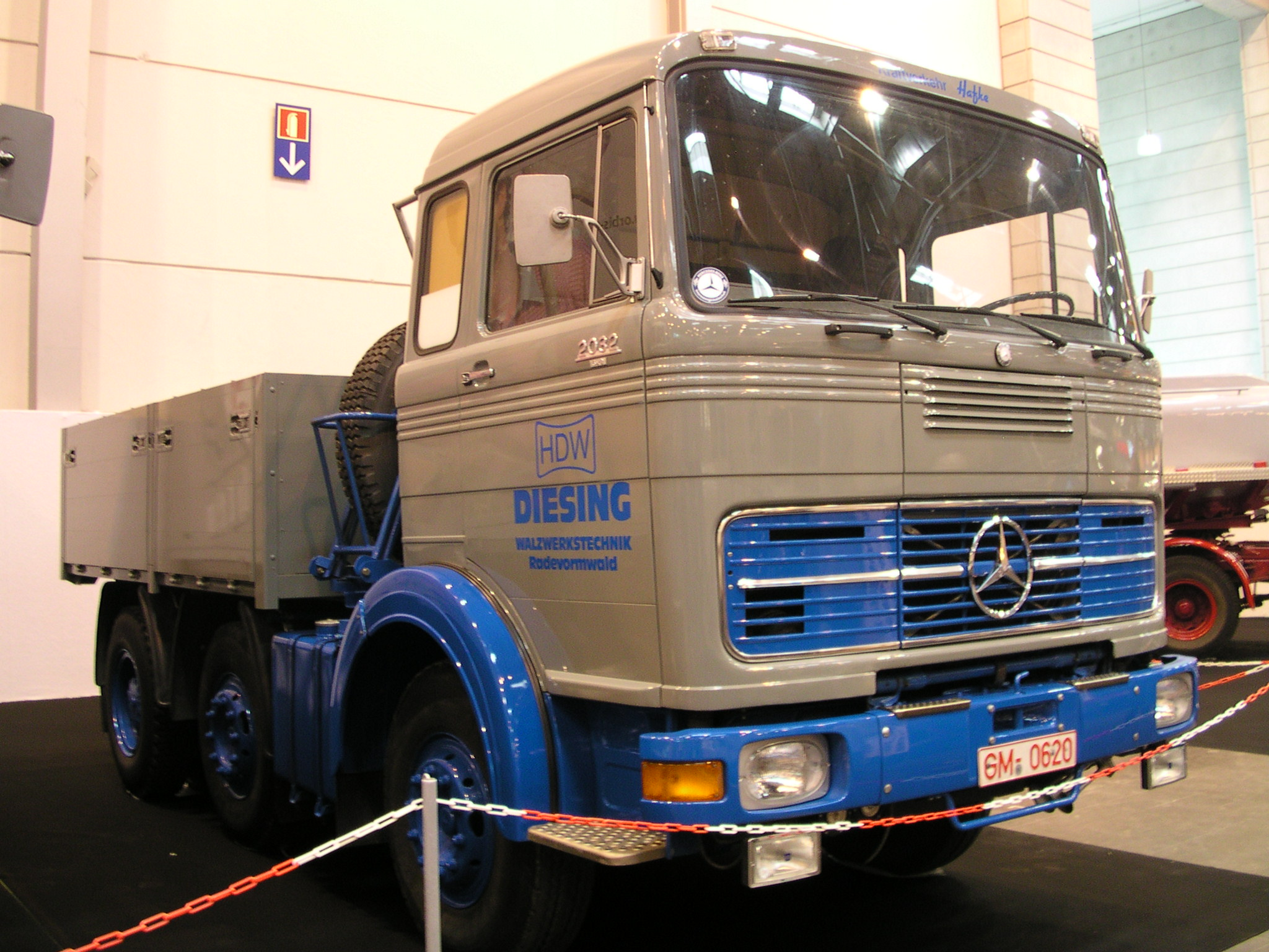 Essen, Technoclassica 2005, Mercedes LPS 2032 (kubische Kabine), Baujahr 1974, 232 kW (320 PS)